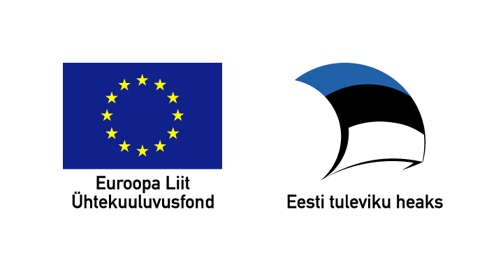 Euroopa Liidu Ühtekuuluvusfondi horisontaalne logo